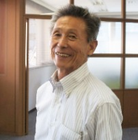 澤上篤人2016